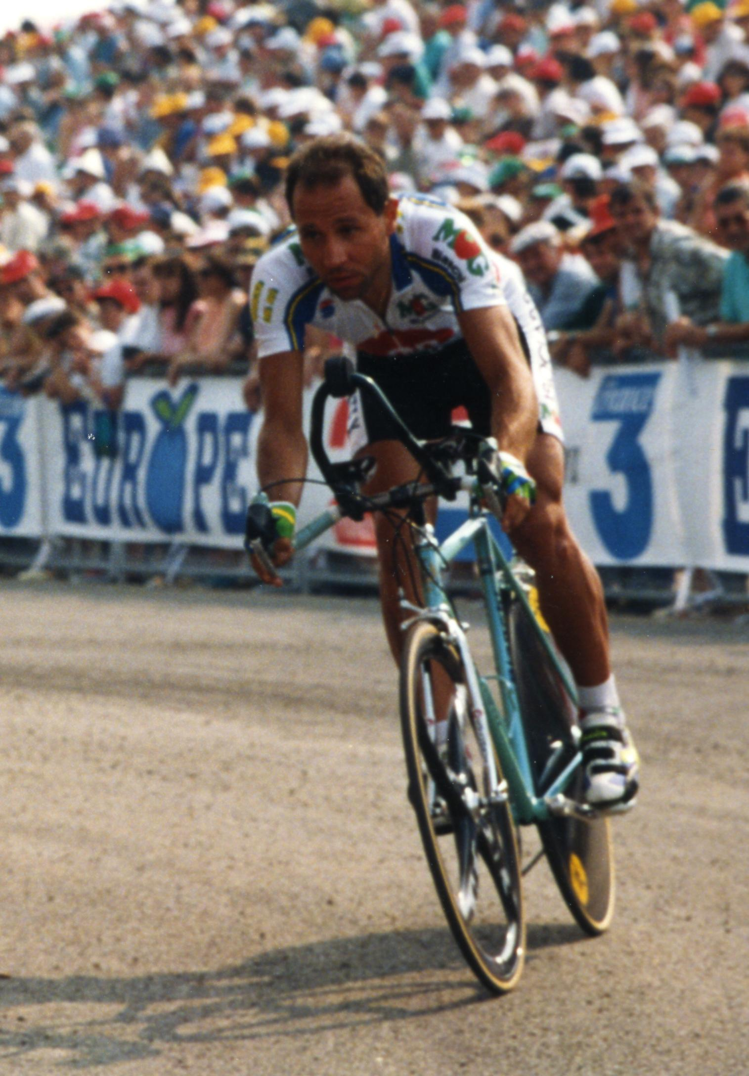 TOUR DE FRANCE 1993